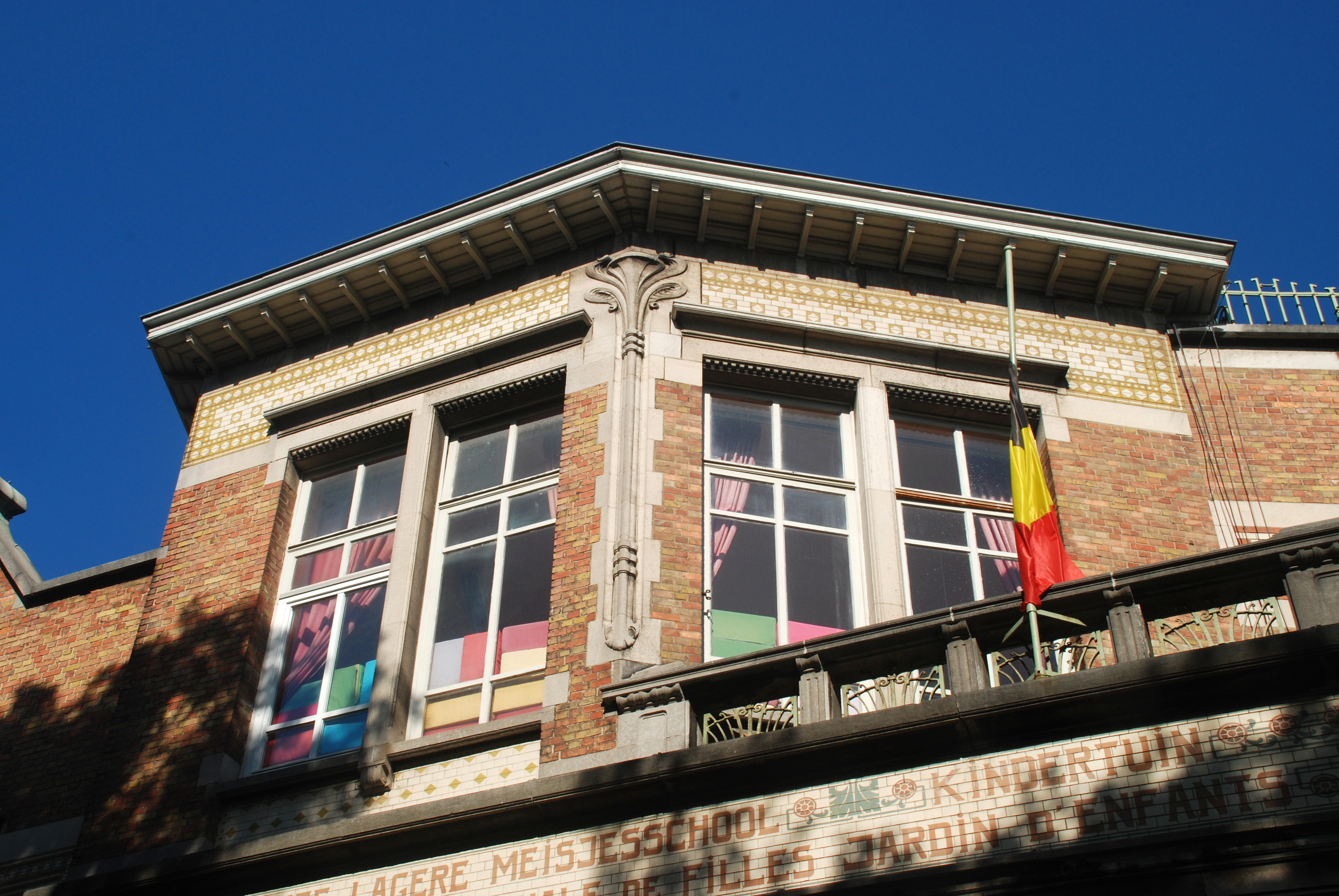 Belgique - Bruxelles - Centre scolaire du Souverain